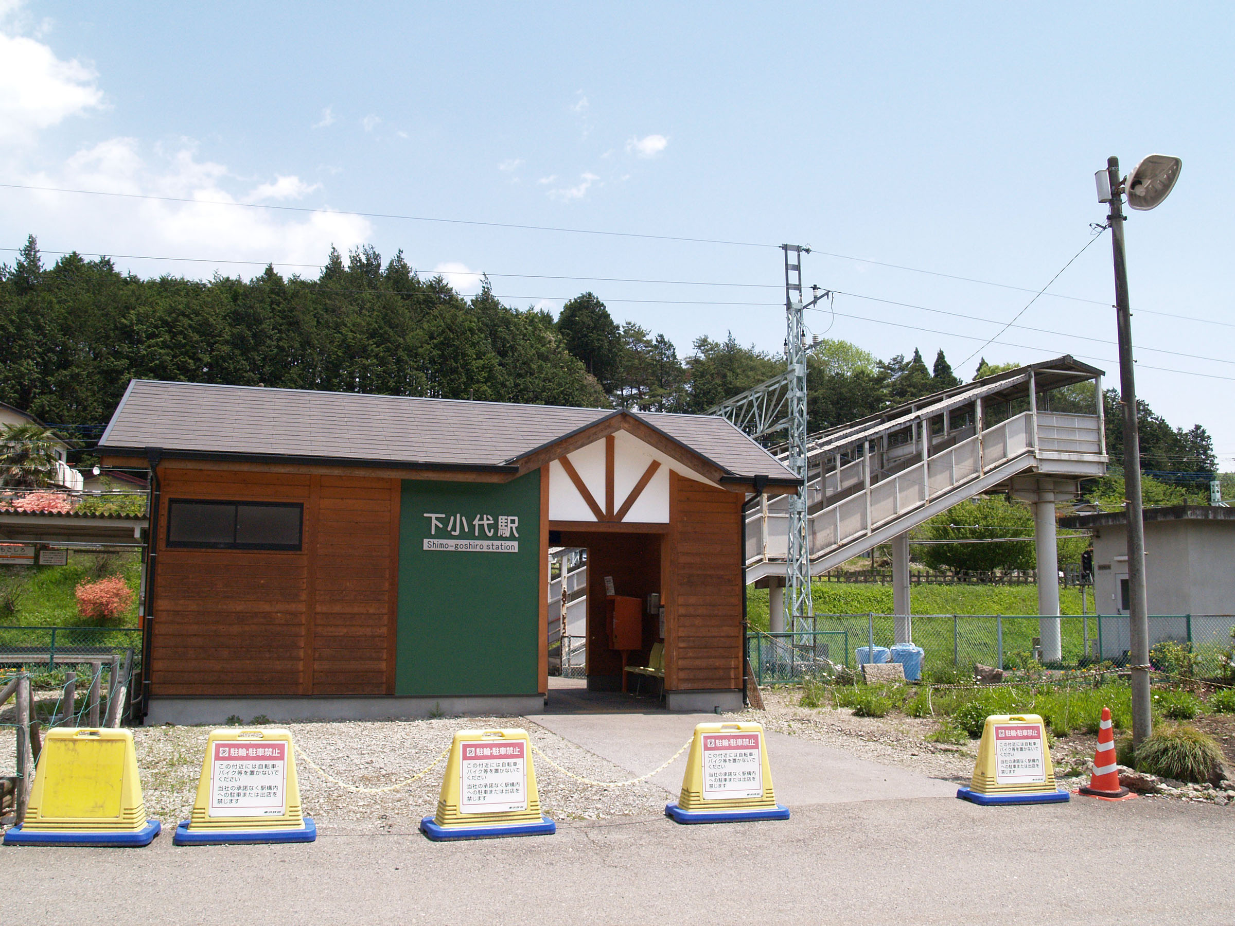 下小代駅駅舎